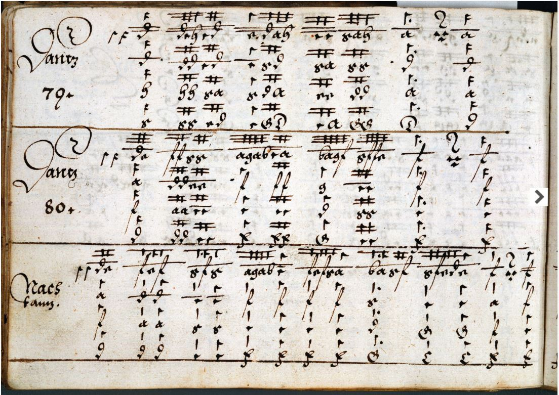 Scan einer Seite aus der Linzer Orgeltabulatur aus den Jahren 1611 bis 1613; heute Bestandteil der Musikaliensammlung des Oberösterreichischen Landesmuseums in Linz